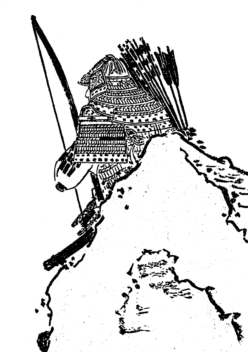 土肥実平、平安時代末期 - 鎌倉時代初期の武将。／江戸時代『前賢故実』より。画：菊池容斎。